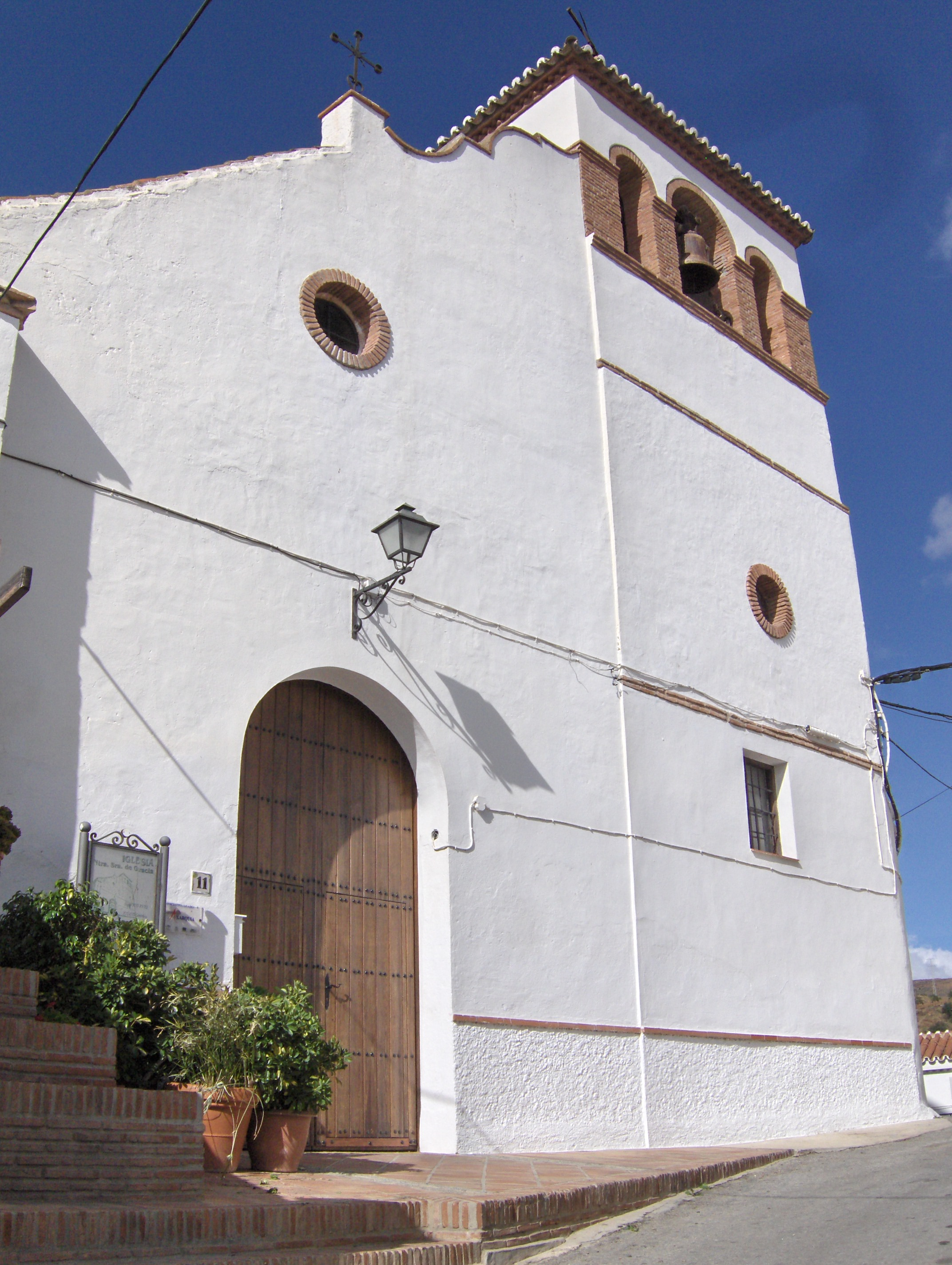 Iglesia de Nuestra Señora de Gracia, Moclinejo, Málaga, España.